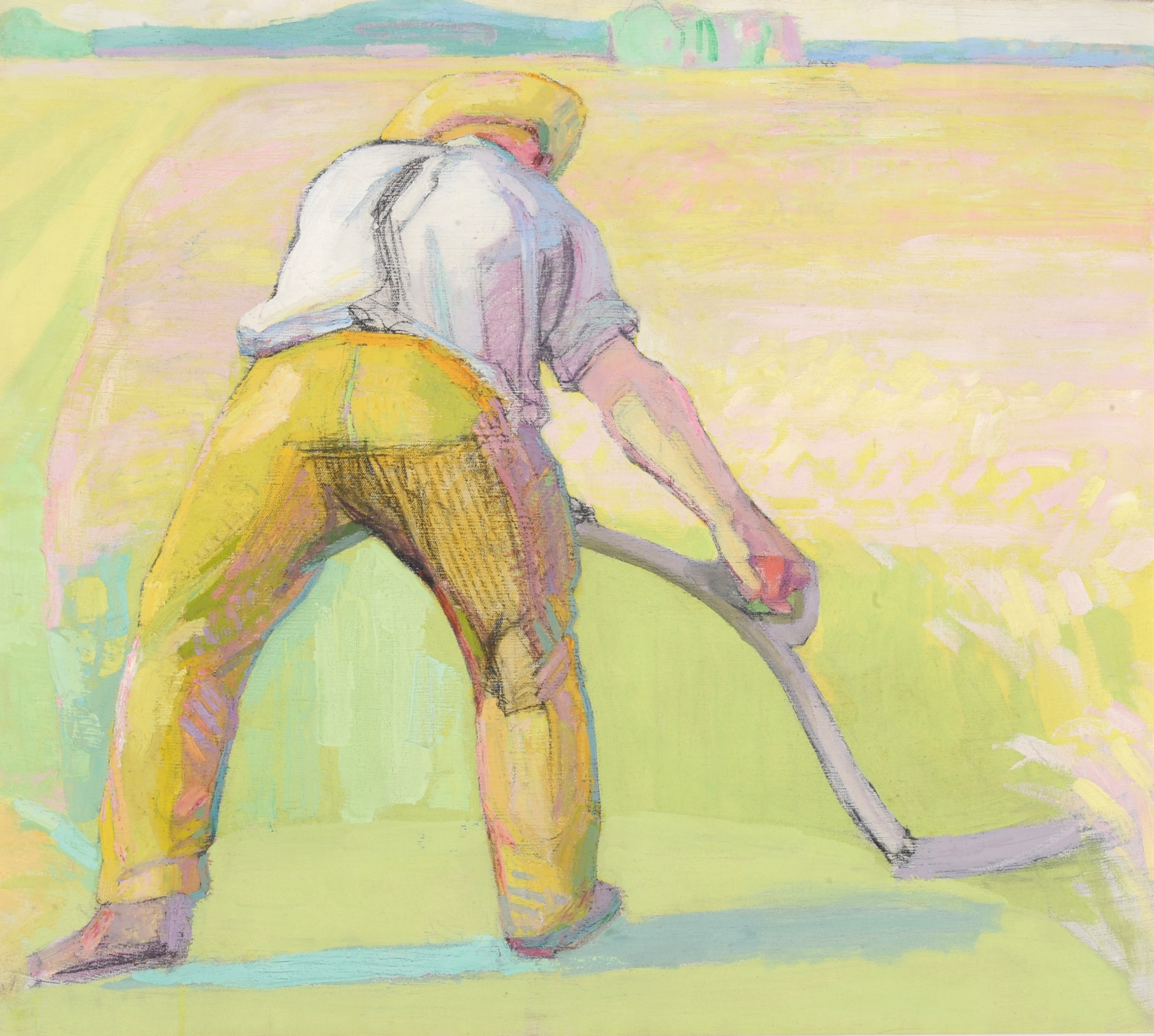 Abraham Hermanjat, Faucheur de dos, sans date, fusain et huile sur toile, 90 x 101 cm. Nyon, Fondation Abraham Hermanjat.